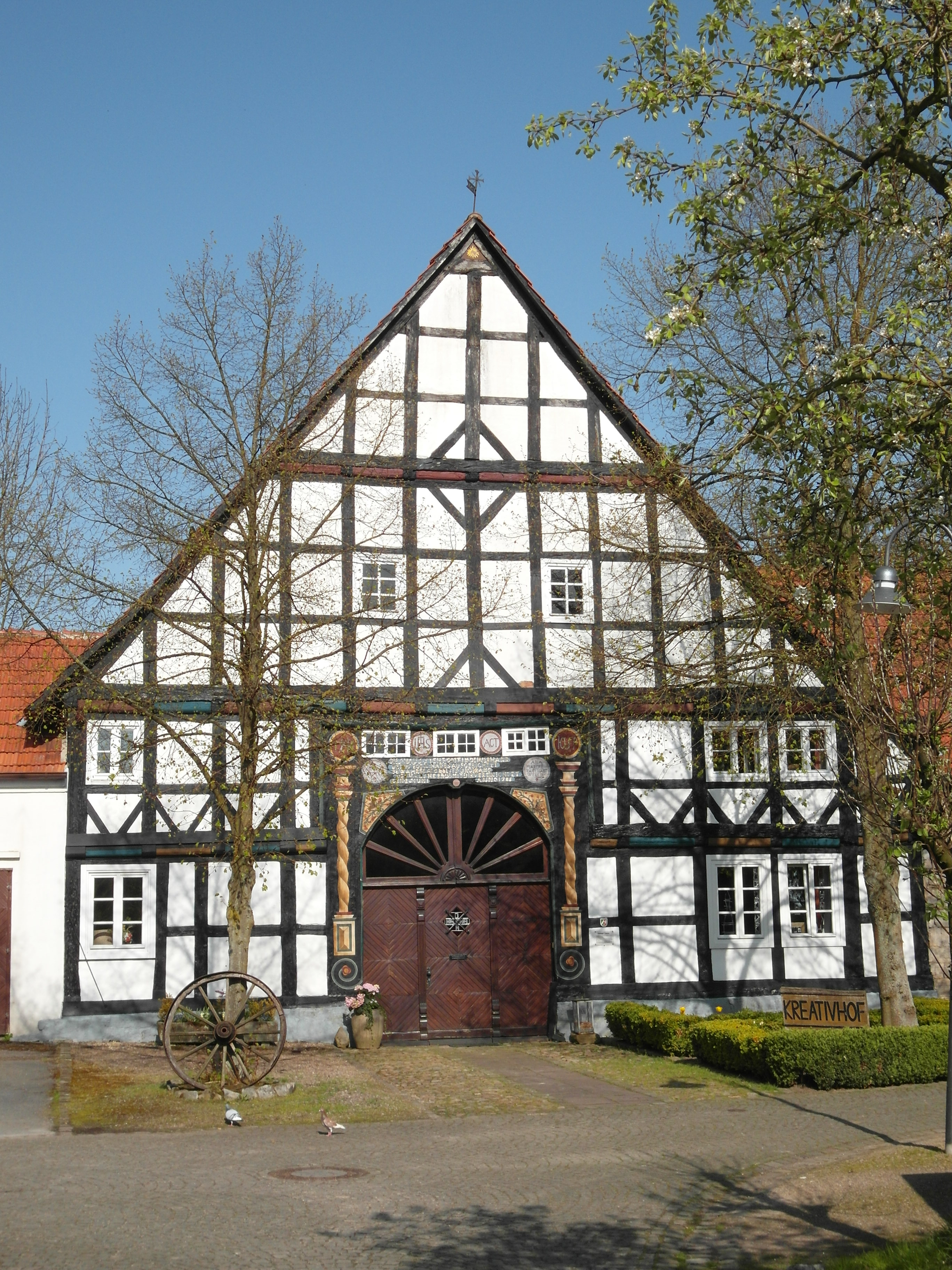 Dieses Foto zeigt die Fassade des Zehnthofes in Bellersen (Brakel). This is the photograph of an architectural monument. It is part of the list of cultural monuments of Brakel, no. 48